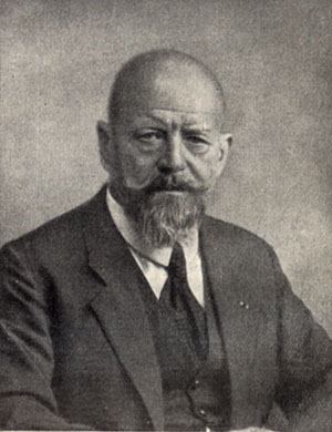 Friedrich von Chlingensperg (1860-1944), Regierungspräsident der Pfalz